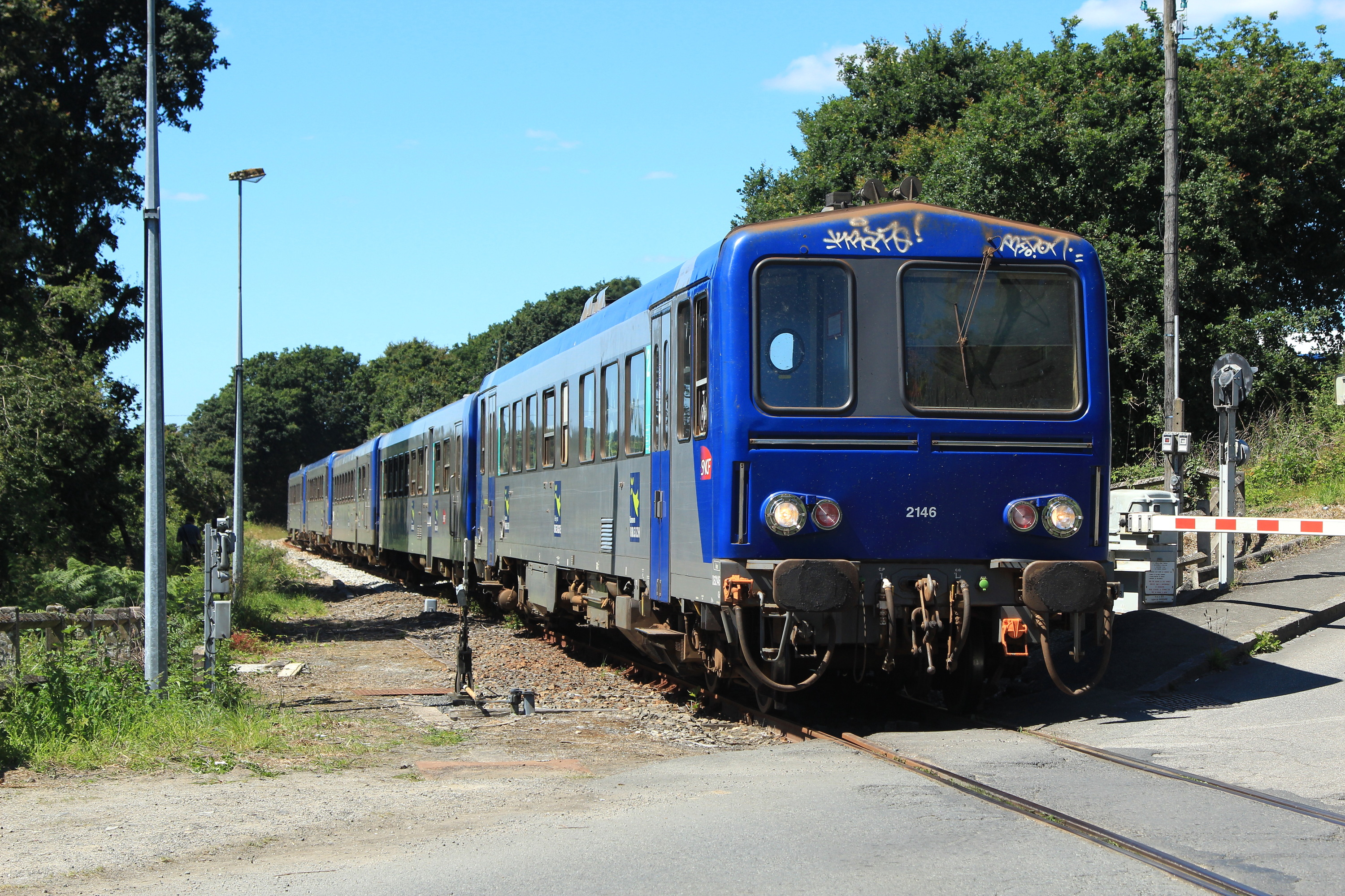 Le TER n° 855329 Guingamp - Carhaix, composé de trois X 2100 et deux XR 6000 approche de son terminus, au PN n°69.